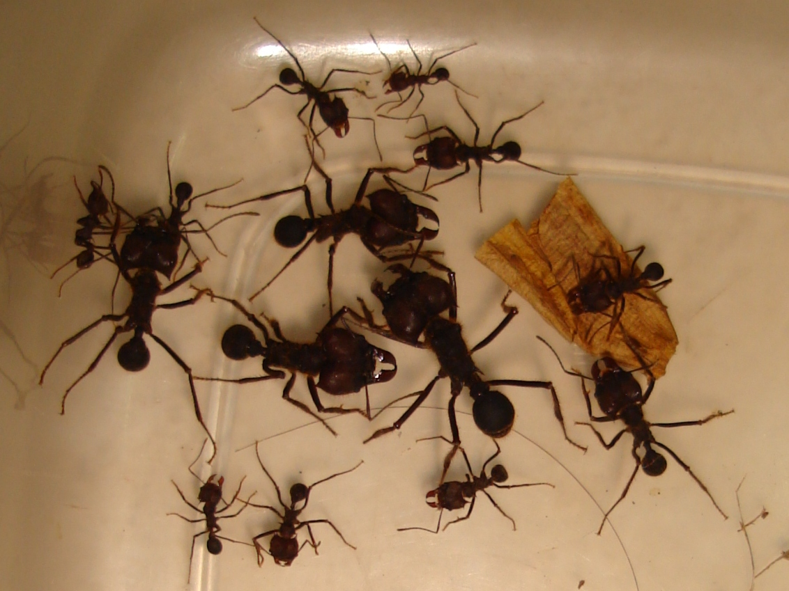 Atta insularis en La Habana recogidas y fotografiadas en una caja